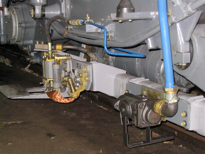 Срывной клапан (на переднем плане), включающий тормозную систему состава метрополитена при срабатывании автостопа.